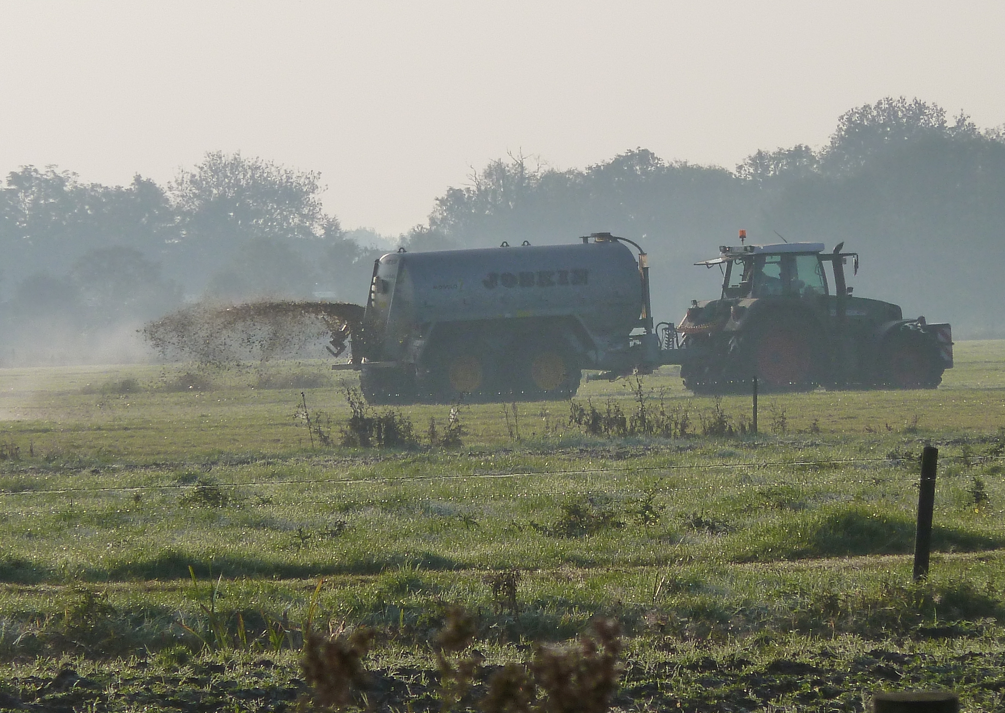 Ausbringen von Gülle auf Grünland